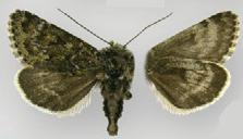 Lasionycta staudingeri preblei female